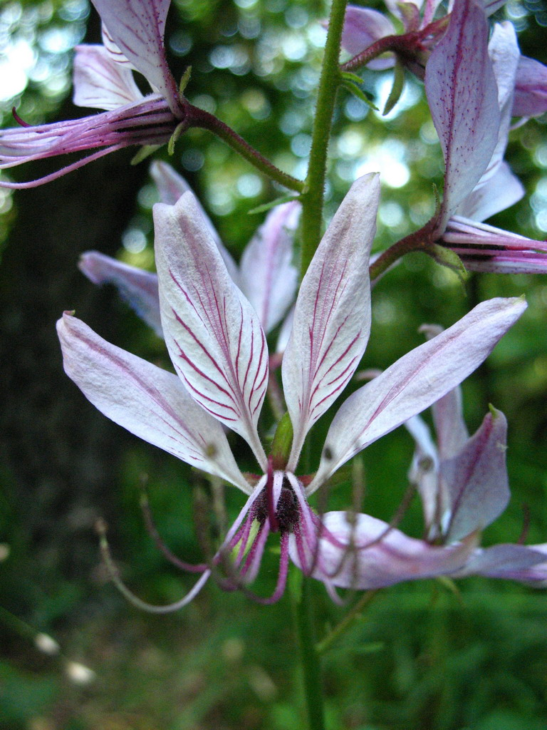 Nagyezerjófű virága